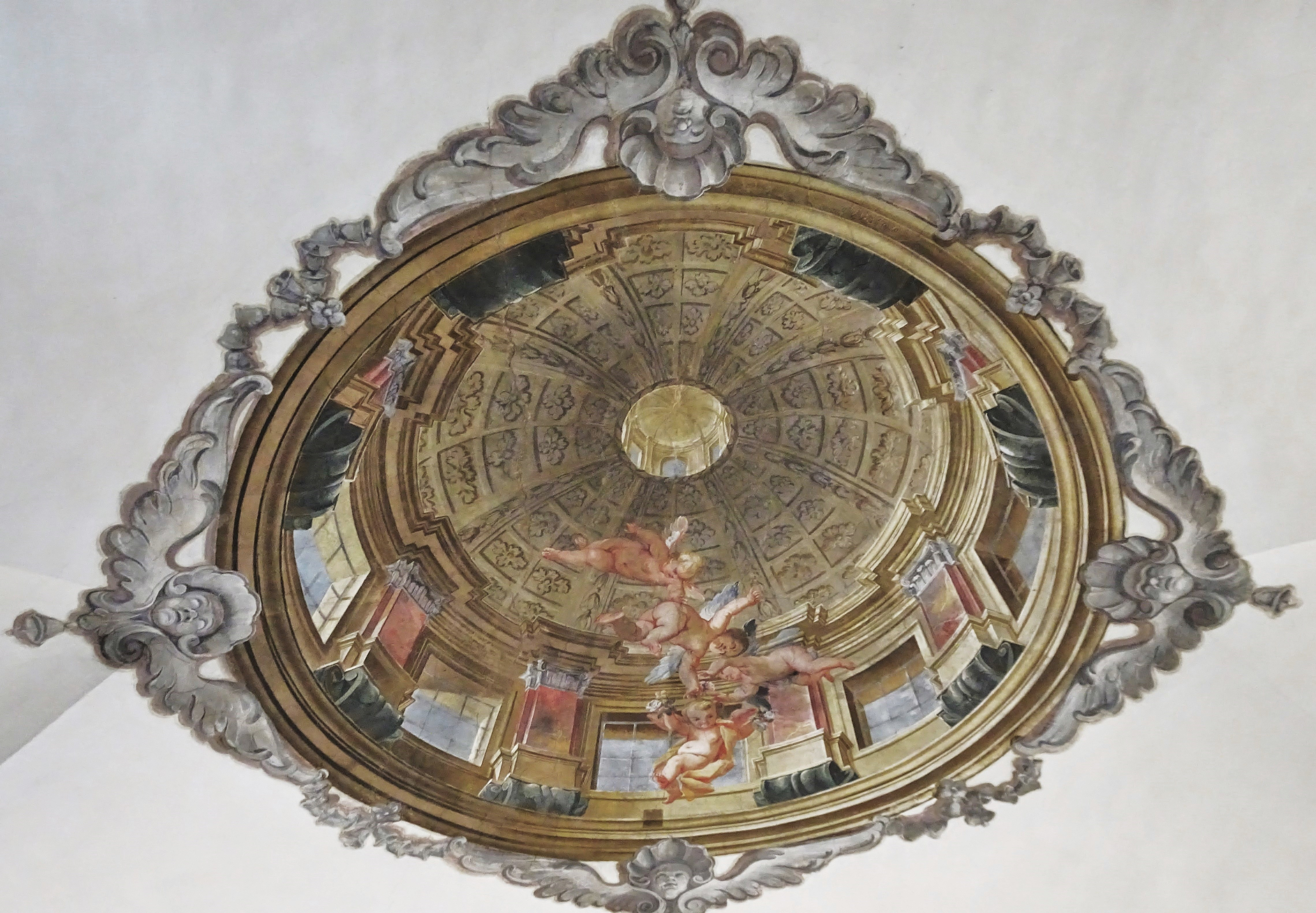 Burgkapelle (Klagenfurt), Scheinkuppel von Fromiller